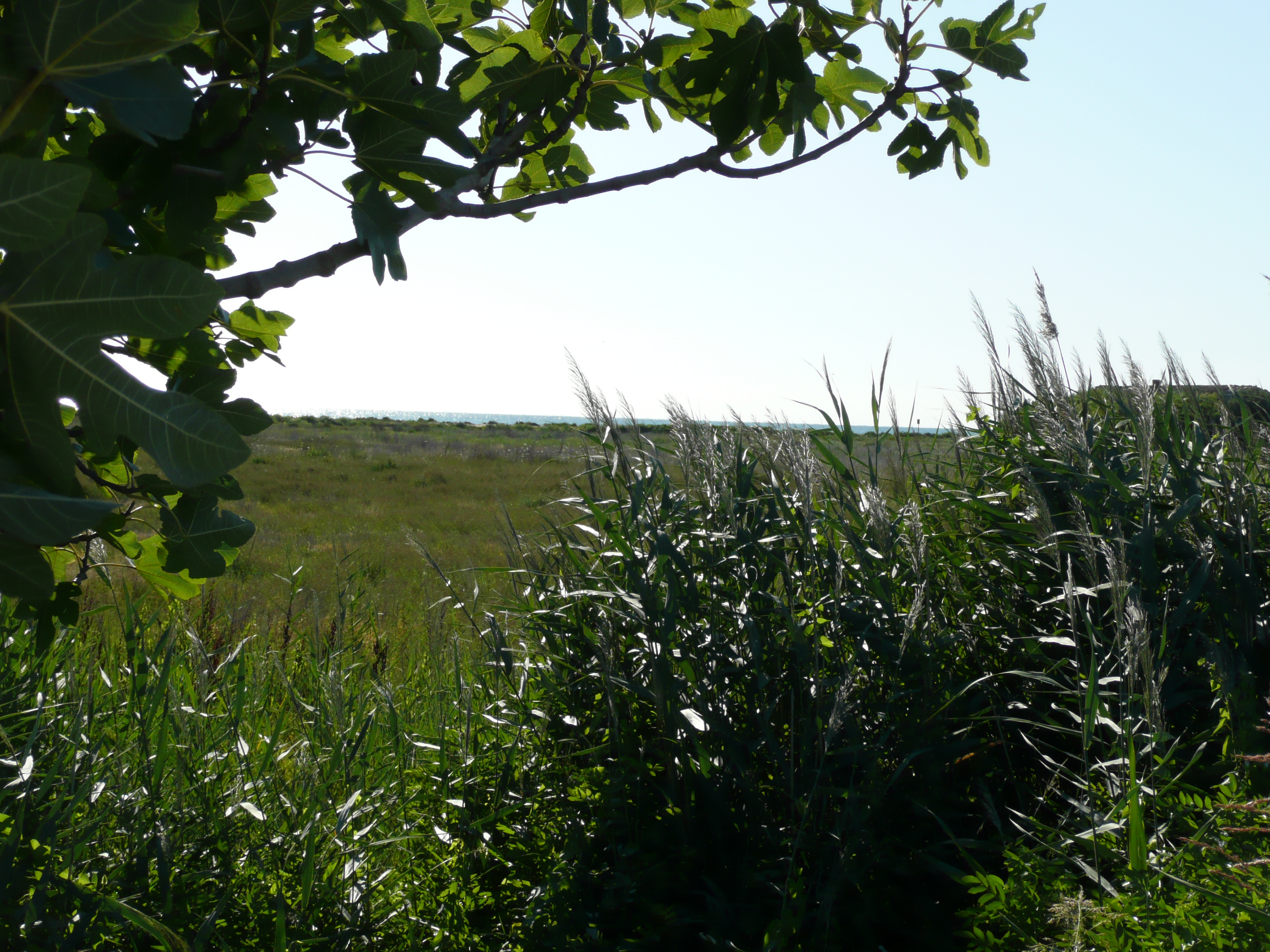 Autore : Lucabron - Fonte : Archivio personale - Descrizione : sentina d'estate - Licenza d'uso : pubblico dominio